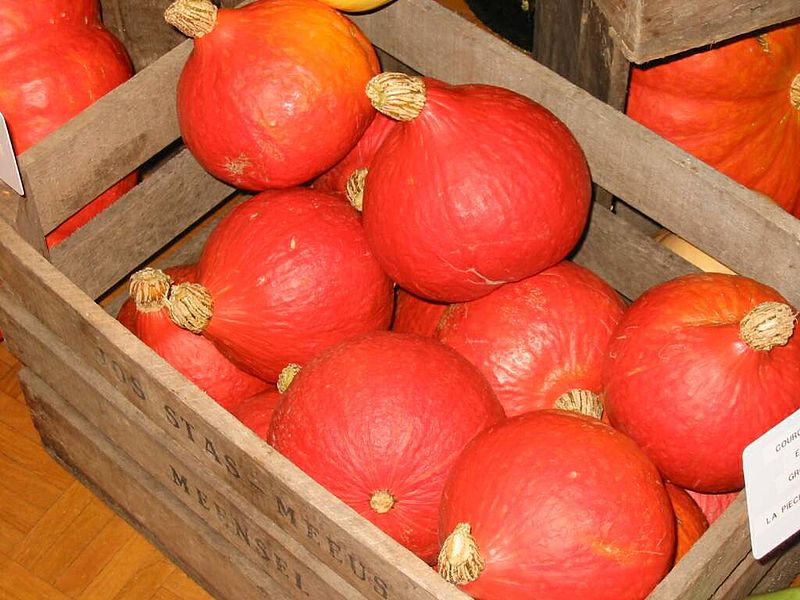 Potimarron (Cucurbita maxima) Photo JH Mora, septembre 2005